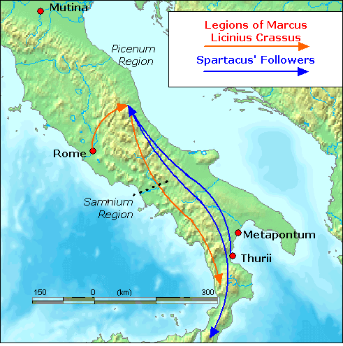 Wikipedia anglais